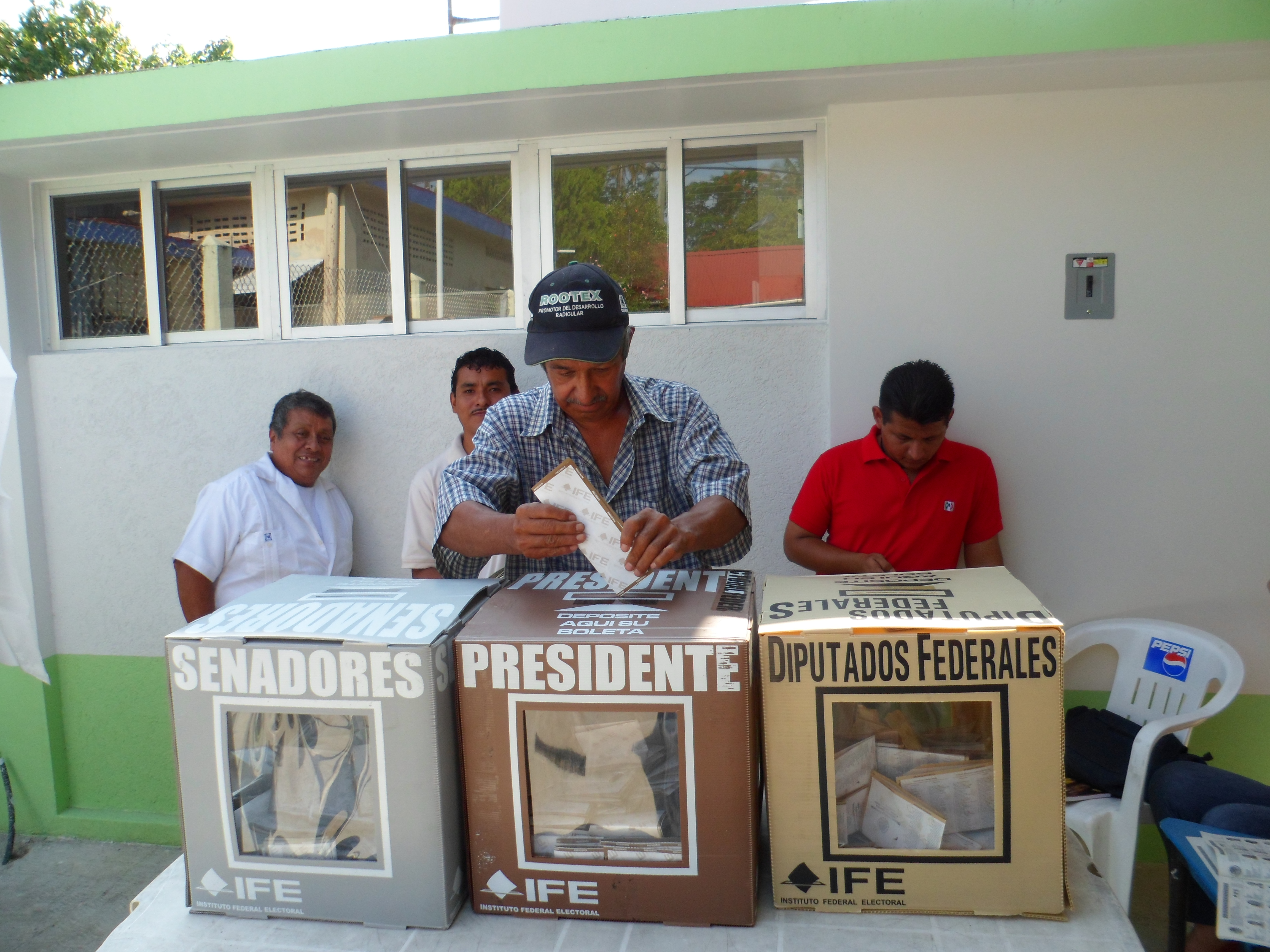 Un ciudadano mexicano ejerciendo el voto, atrás de el algunos observadores electorales y representantes de partidos políticos.